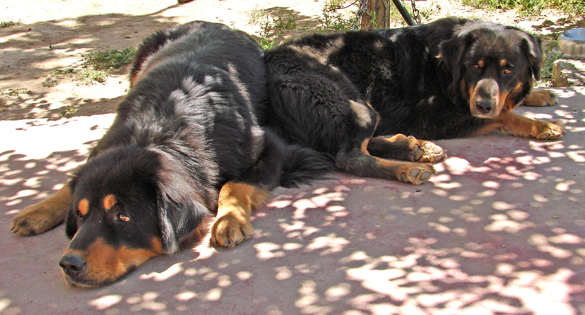 Tibetan Mastiff